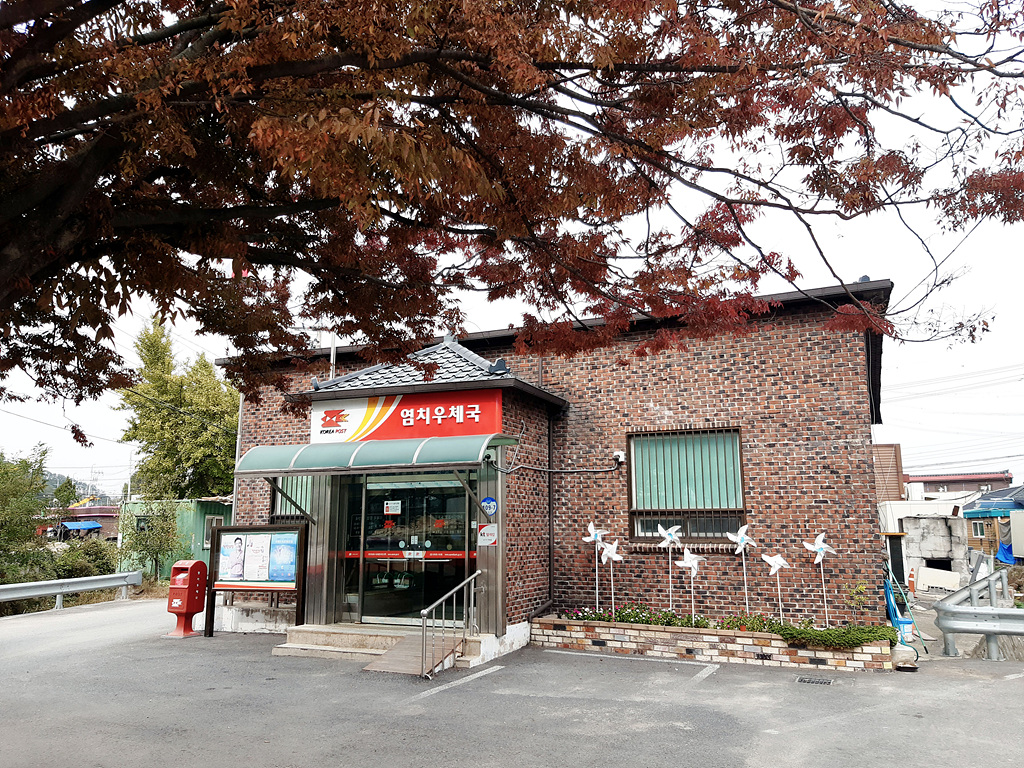 충남 아산시 소재 염치 우체국